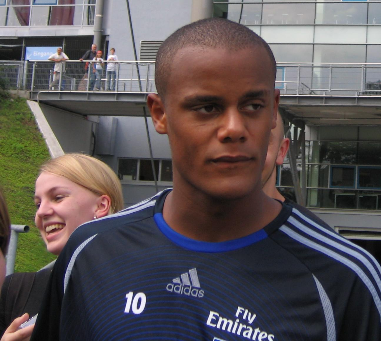 Vincent Kompany, Abwehrspieler des Hamburger SV